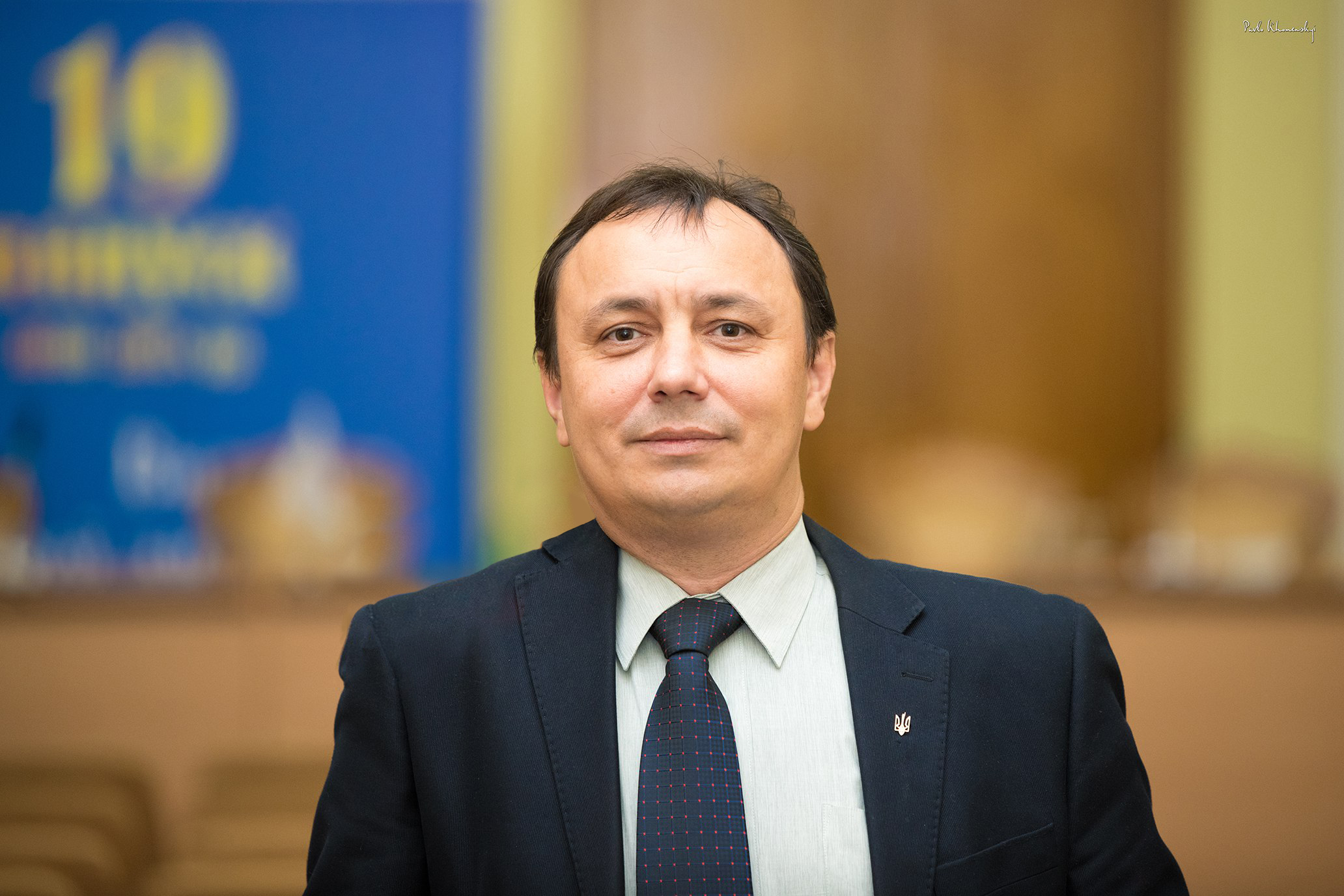 Український історик Павло Гай-Нижник